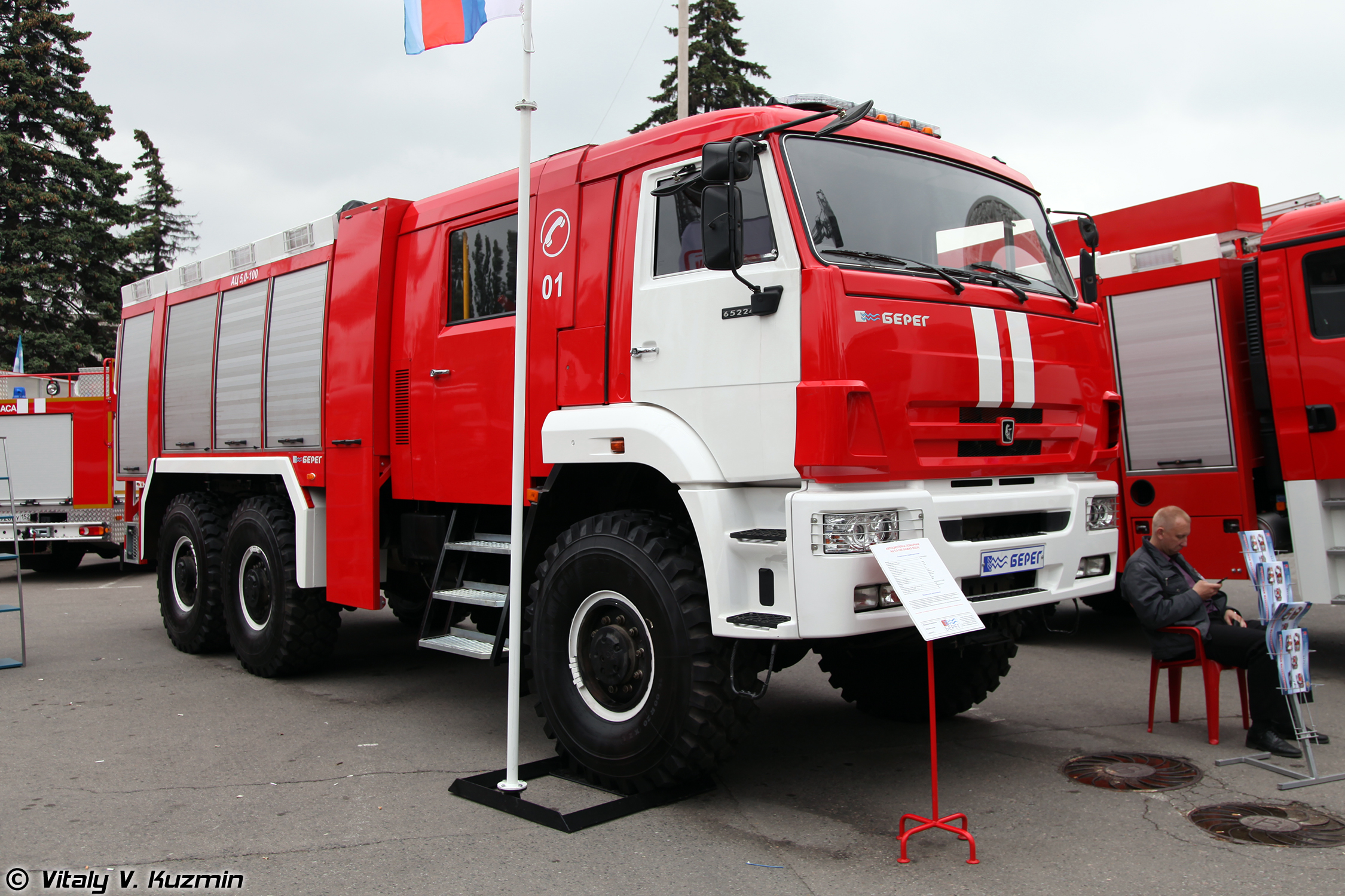 Автоцистерна пожарная АЦ-5,0-100 на шасси КАМАЗ-65224 (Firefighting vehicle ATs-5,0-100 on KAMAZ-65224 chassis)